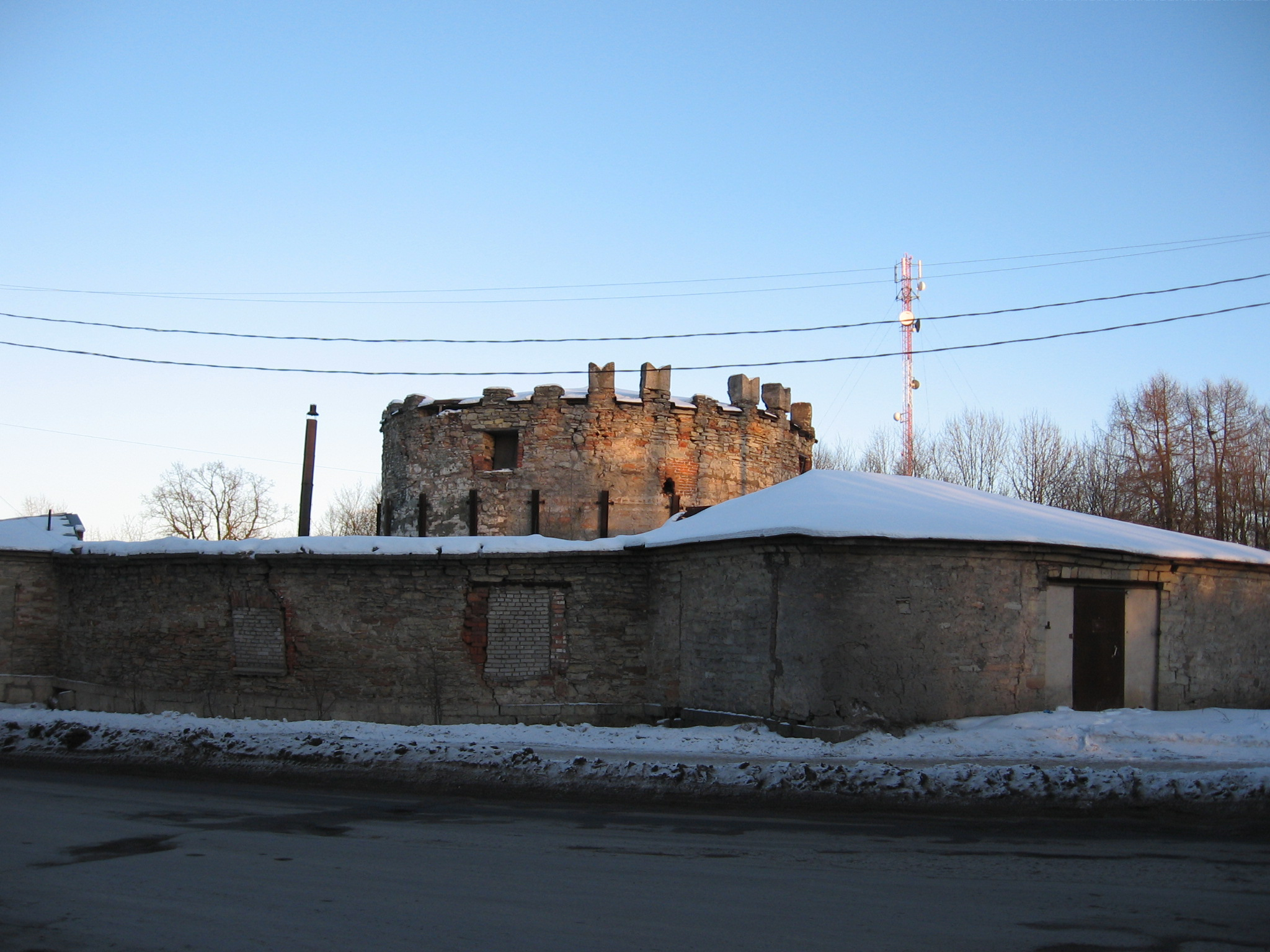 Круглая рига со службами и «Хлебными магазинами» в Гатчине построена не позднее 1760-х годов (архитектор неизвестен), является самым старым из сохранившихся каменных зданий в Гатчине